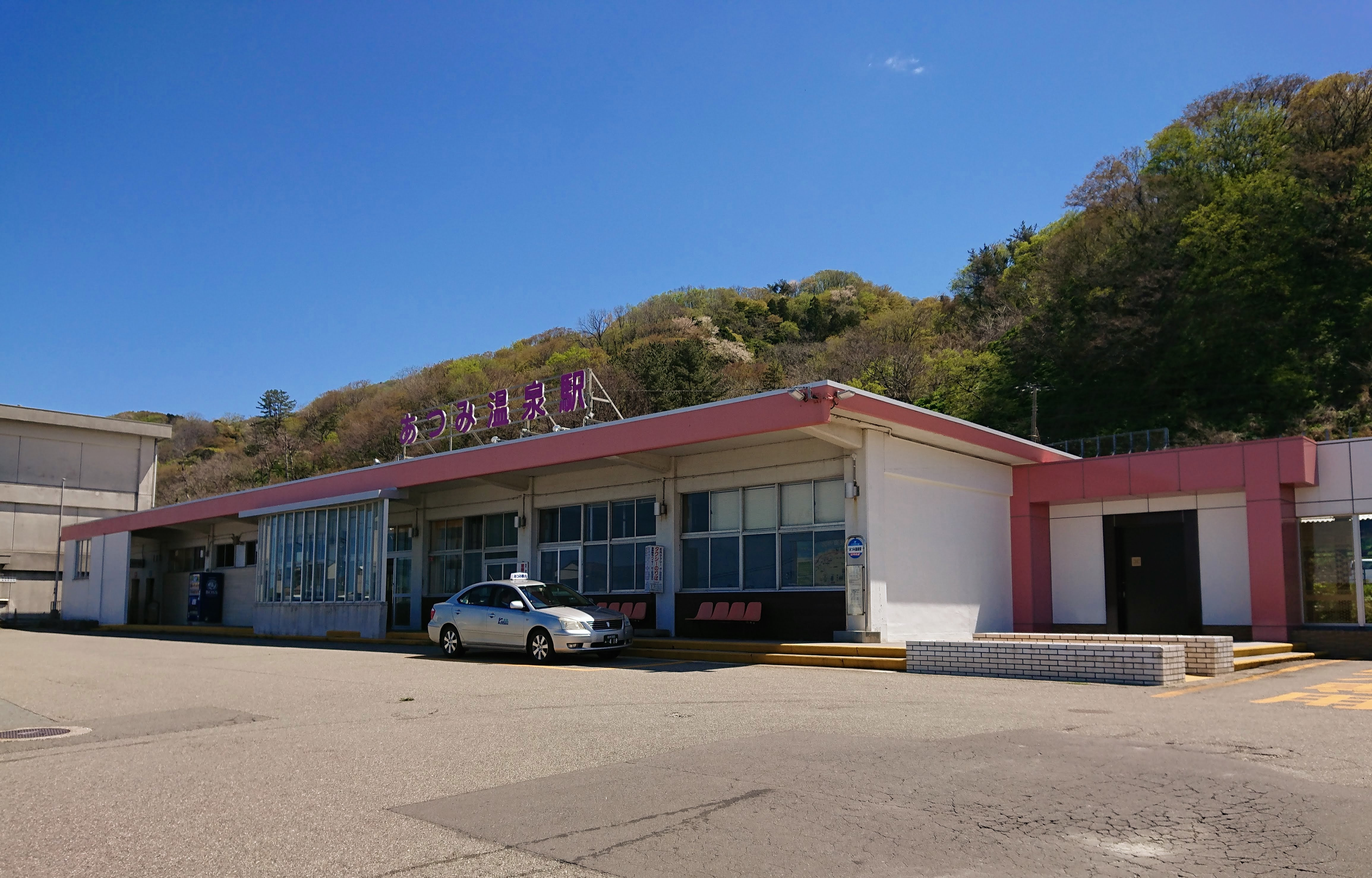 あつみ温泉駅の駅舎外観